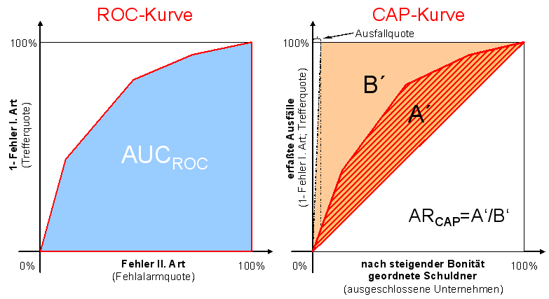 ROC- und CAP-Kurven Quelle: BEMMANN (2005, S. 18)